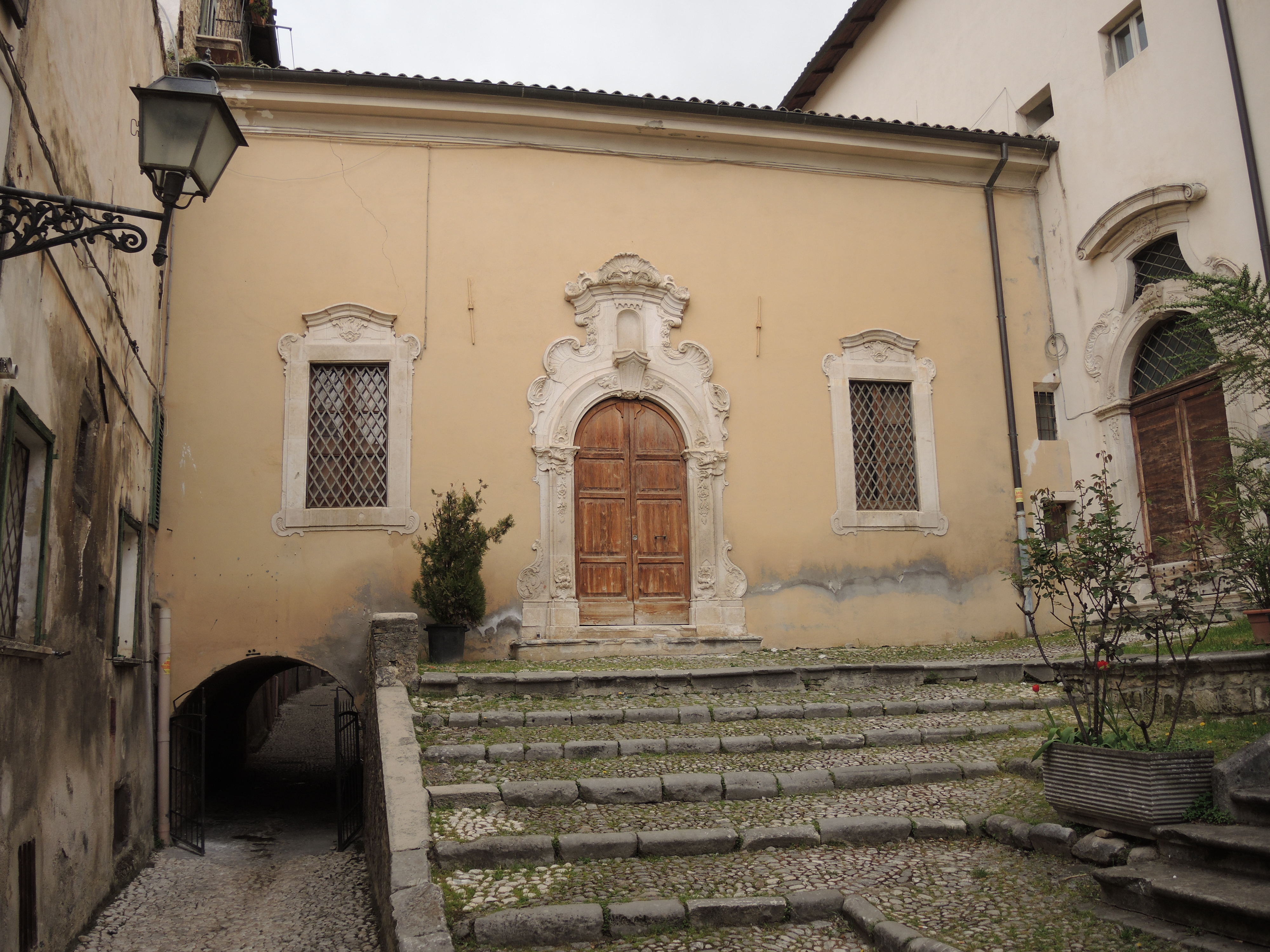 Sulmona: Monastero di Santa Chiara